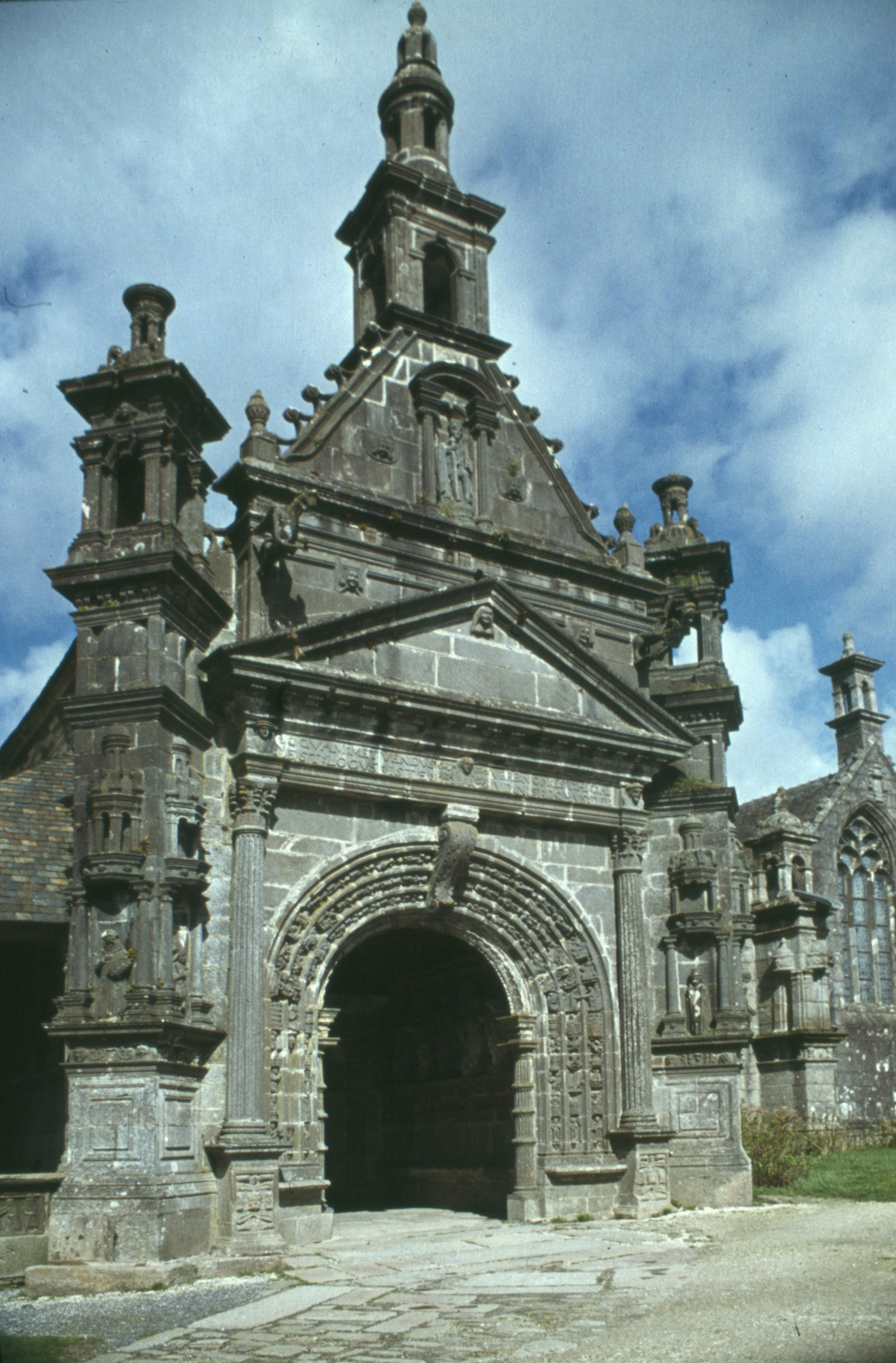 Guimiliau